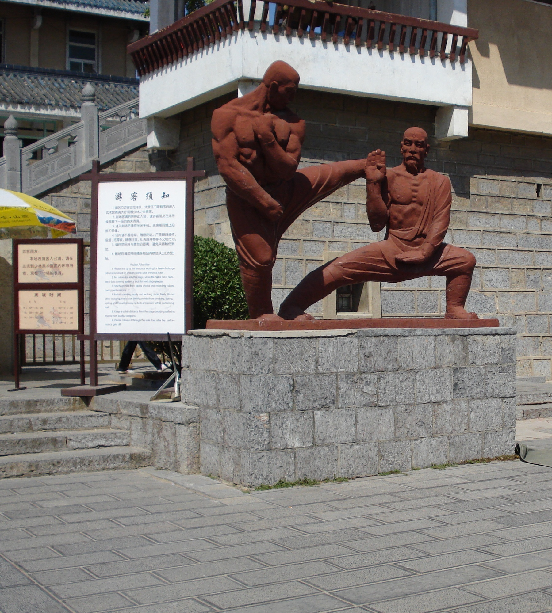 Shaolin